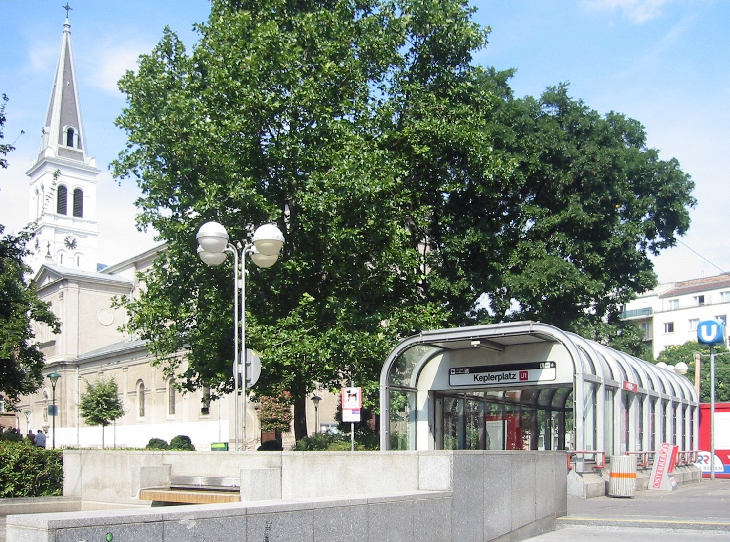 Wien, U-Bahn-Station Keplerplatz